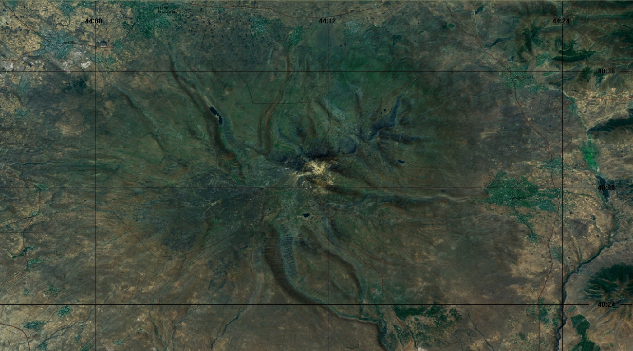 Mount Aragats , reprezentare topografica